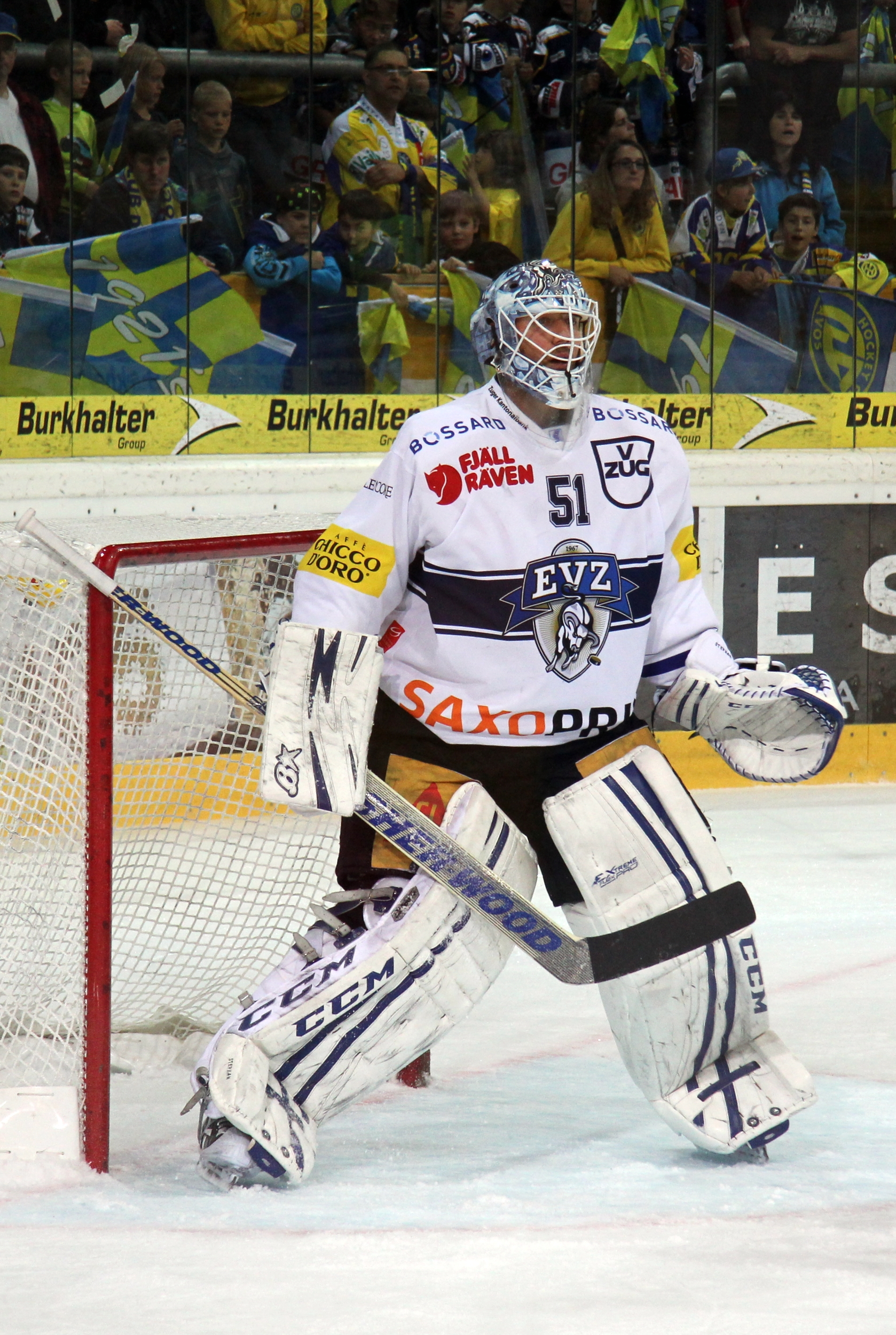 Tobias Stephan (Z 51).